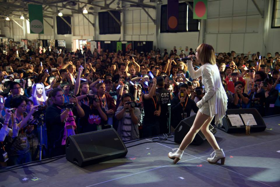 J-POP SUMMIT2015 music live by Eir Aoi